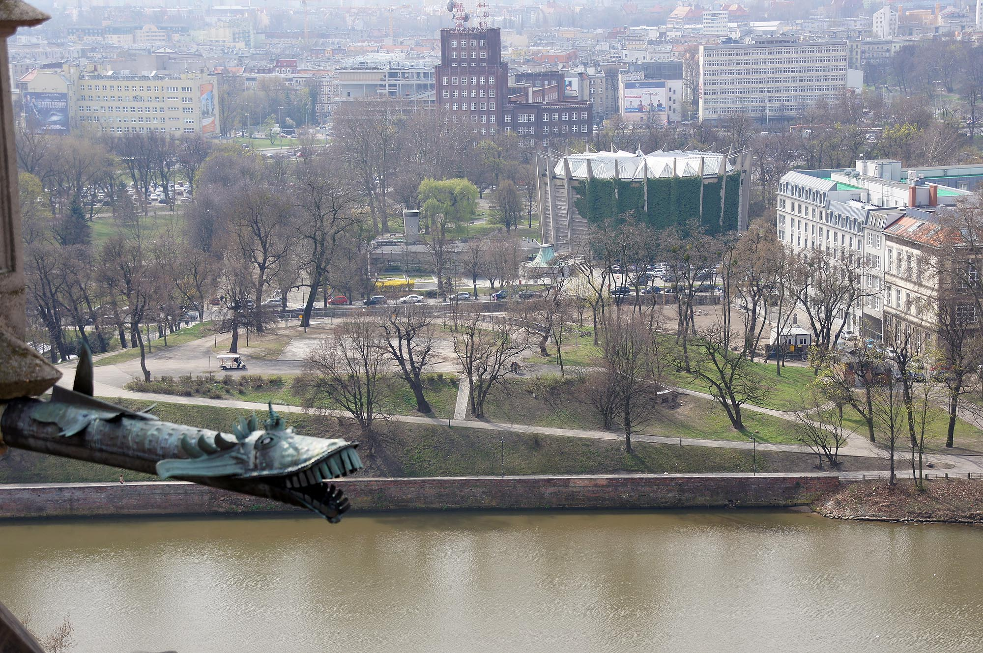 Wrocław, zespół budynków Panoramy Racławickiej z otoczeniem (teren)